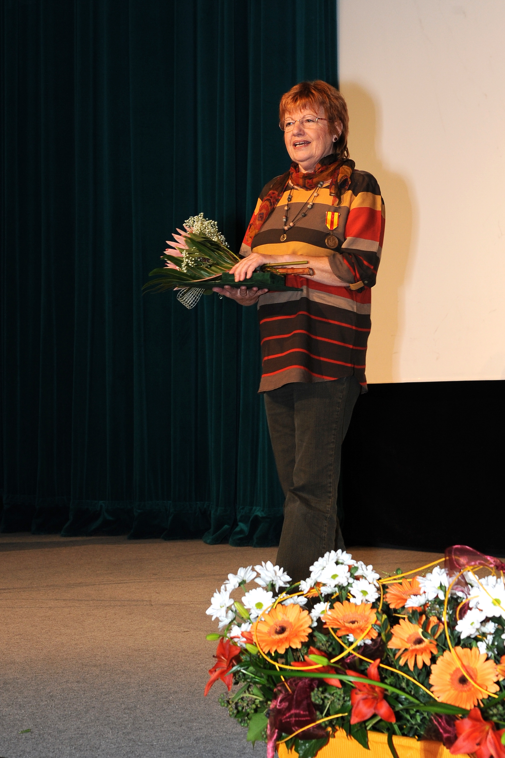 Předávání cen Města mělníka 2011